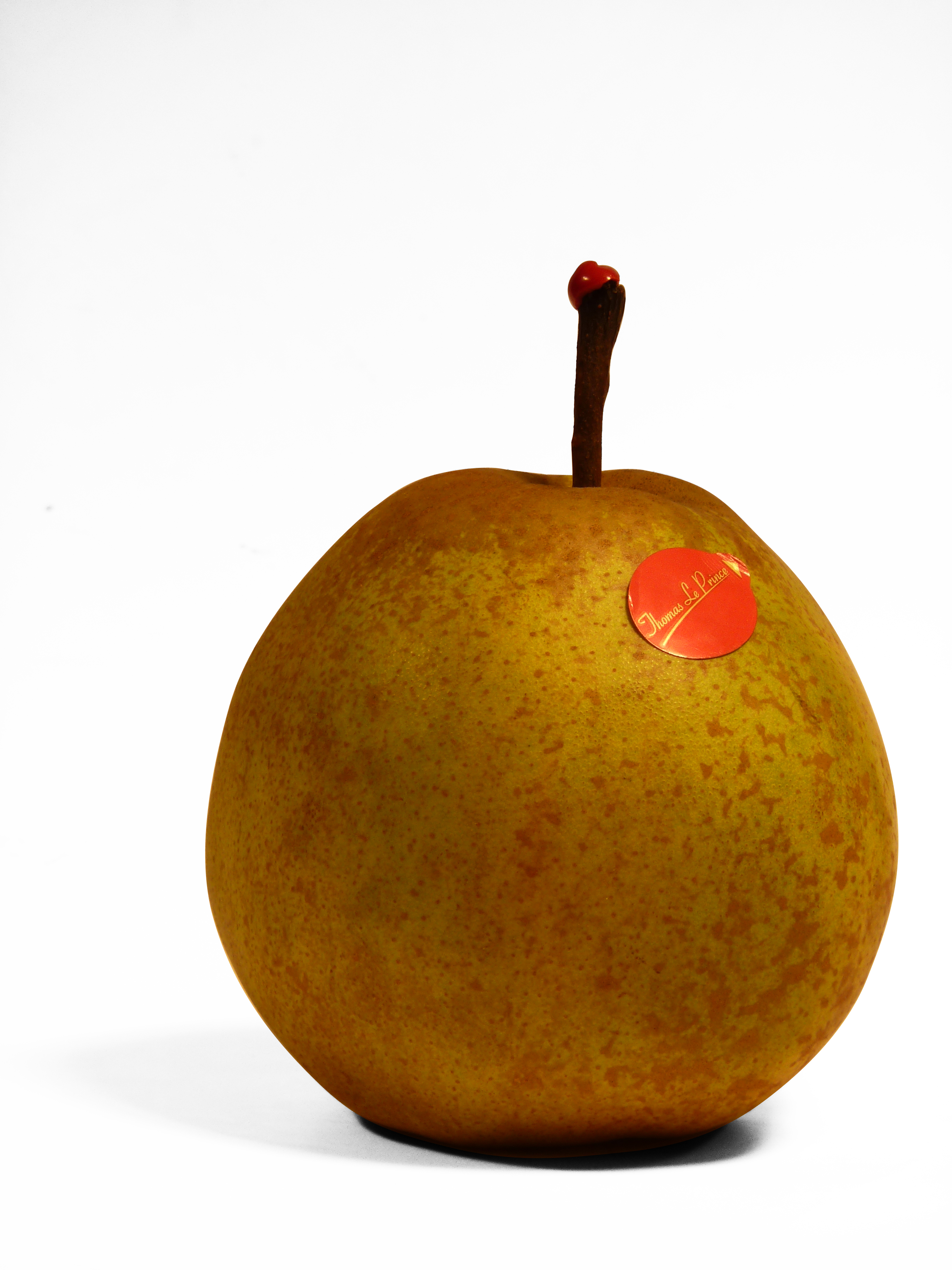 Poire Passe Crassane - exploitation SA Thomas LE PRINCE